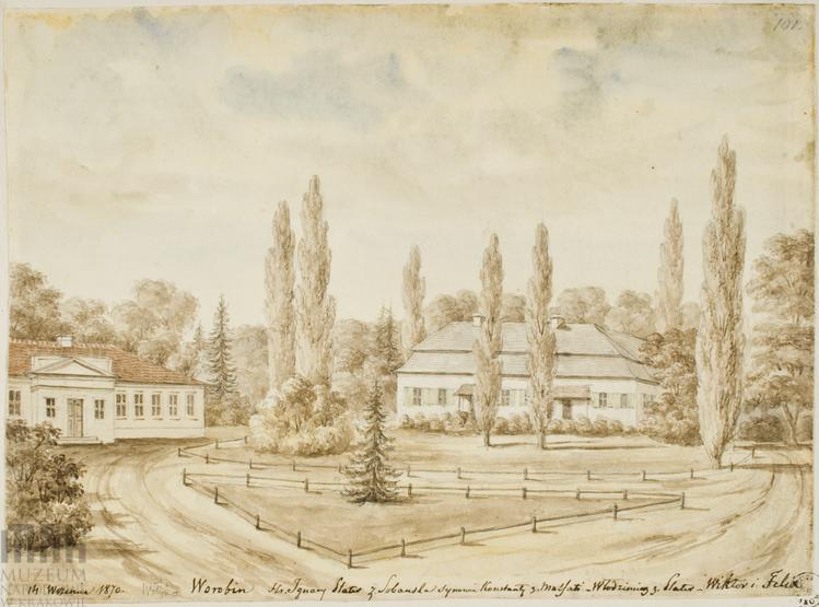 Дубровиця-Воробин. Маєток Броель-Плятерів.